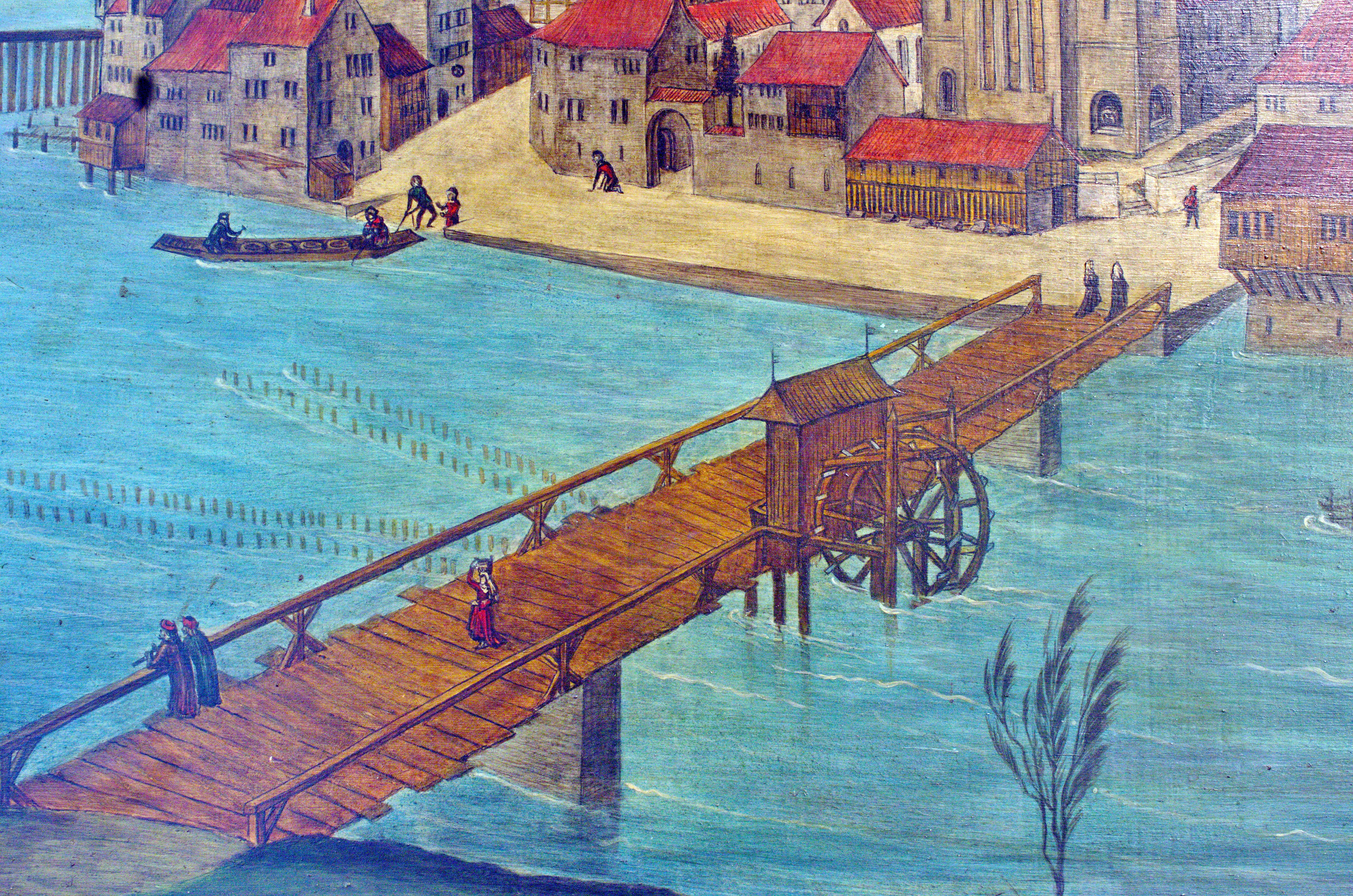 Die Münsterbrücke auf der Replik der Altartafeln von Hans Leu im Baugeschichtlichen Archiv der Stadt Zürich im Haus zum Rech. Die Panoramansicht des linksseitigen Limmatufers – 'Standort' der BetrachterIn ist wohl der Karlsturm des Grossmünsters – von Hans Leu d. Ä. gilt als die älteste zuverlässige Darstellung der Stadt Zürich, Ende des 15. Jahrhunderts auf den Altartafeln im Grossmünster mit viel Liebe zum Detail festgehalten. Die originalen Tafeln sind heute im Landesmuseum ausgestellt, eine (vermutlich) 1:1 Replik ist im Stadtarchiv öffentlich zugänglich.